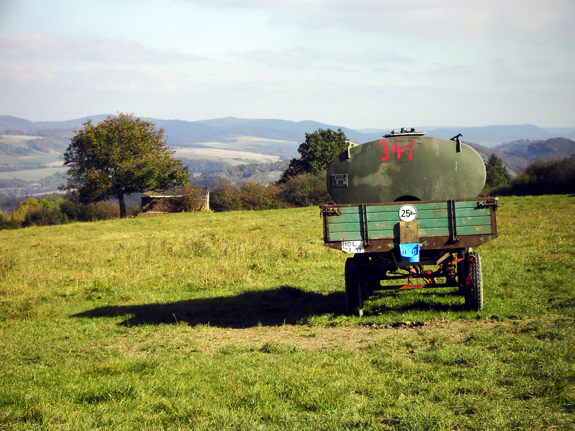 Weserbergland zwischen Heinsen und Polle – Der Wilmeröder Berg